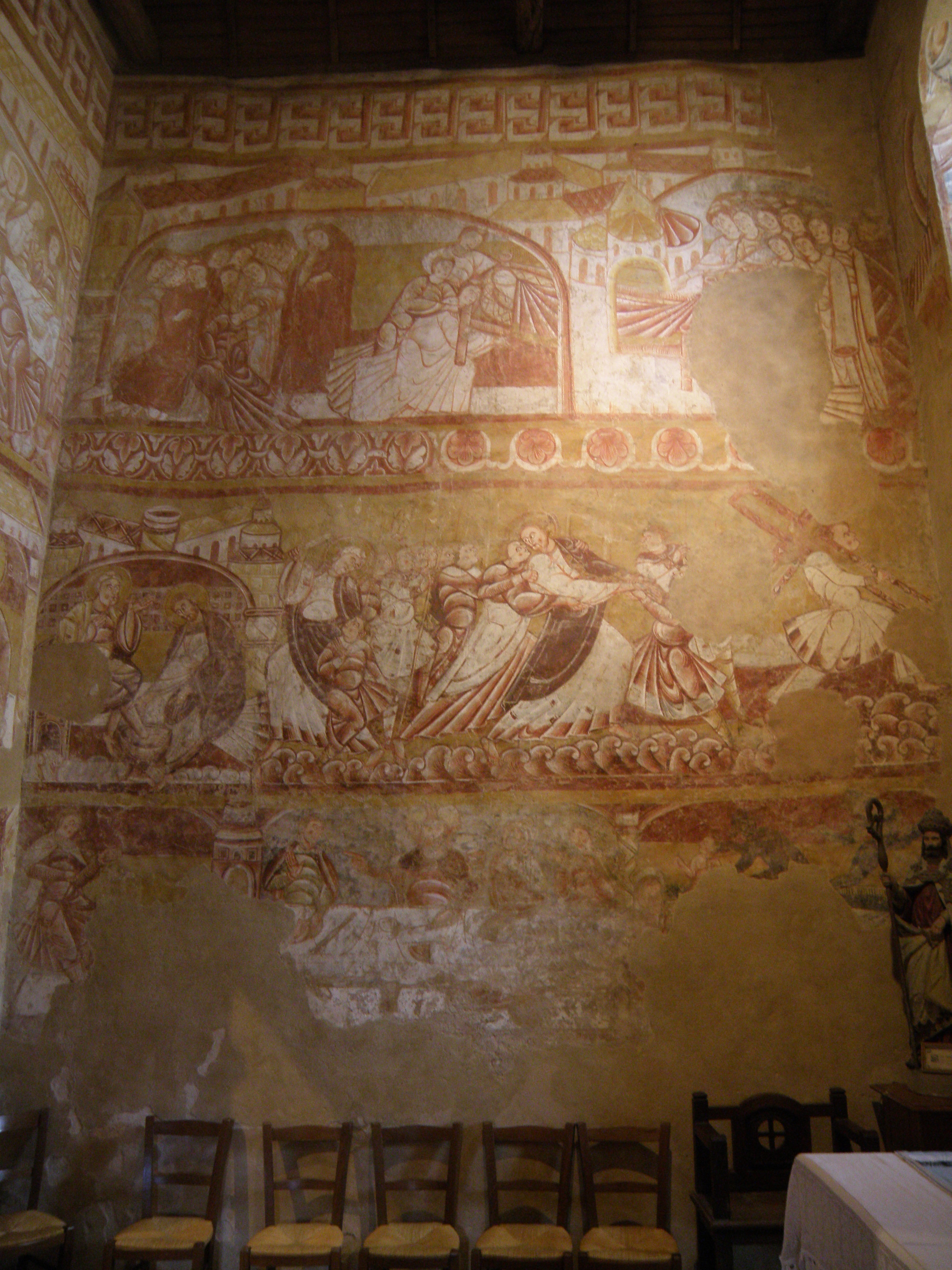 Fresques du mur nord du chœur de l'église Saint-Martin de Nohant-Vic